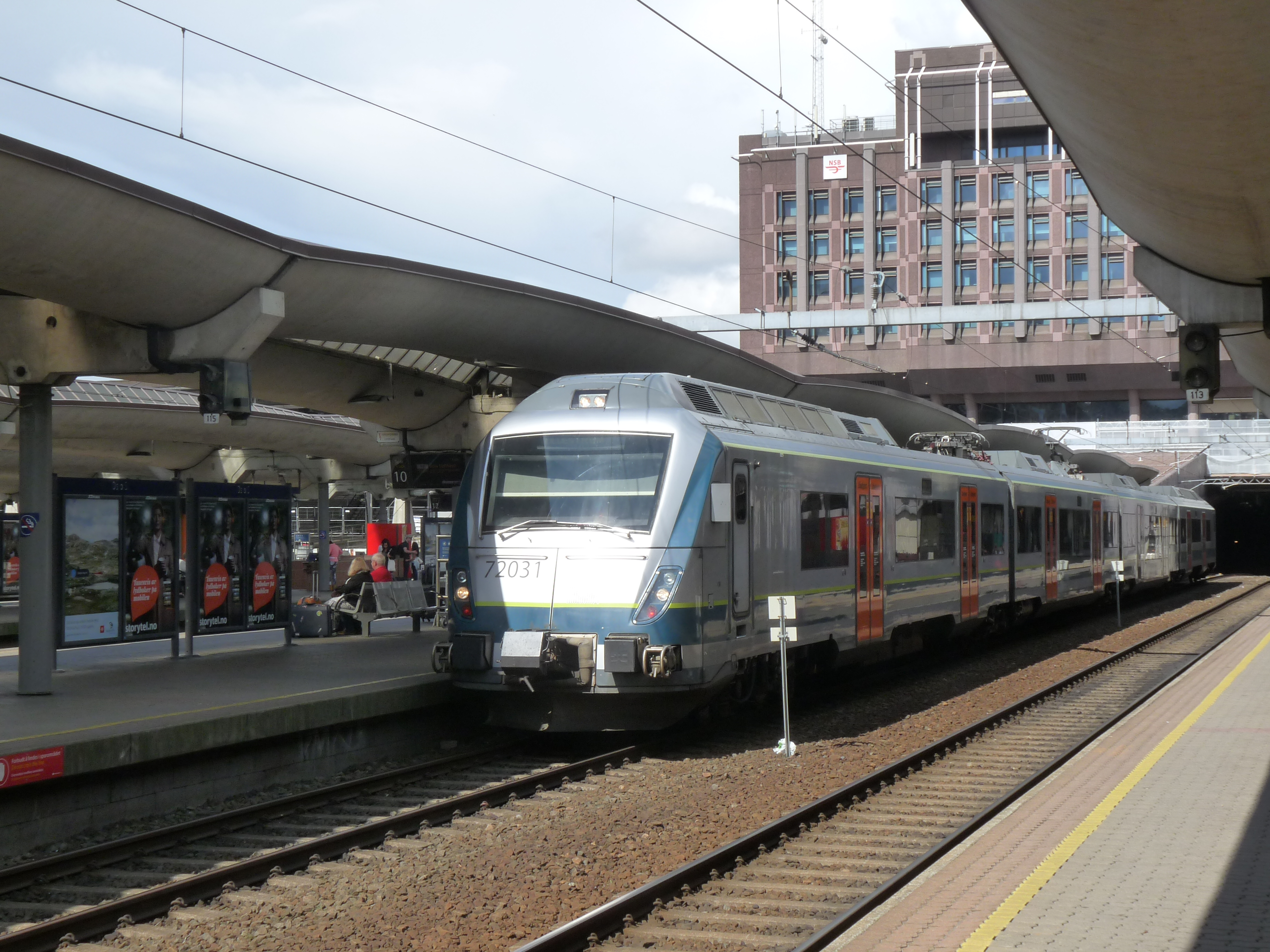 Oslo Sentralstasjon treinen in 2016